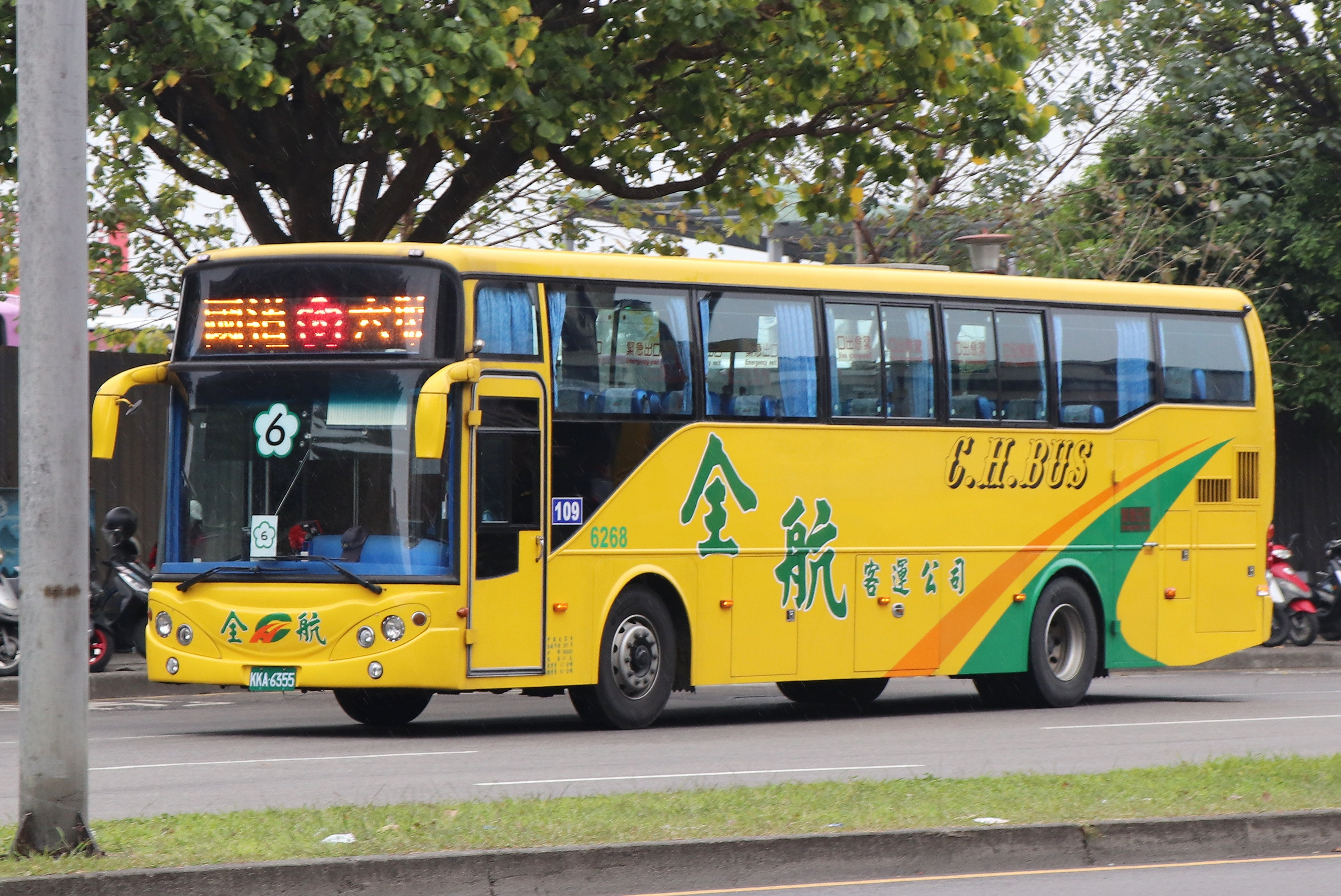 全航客運 FUSO RM11FN2XC大客車 KKA-6355